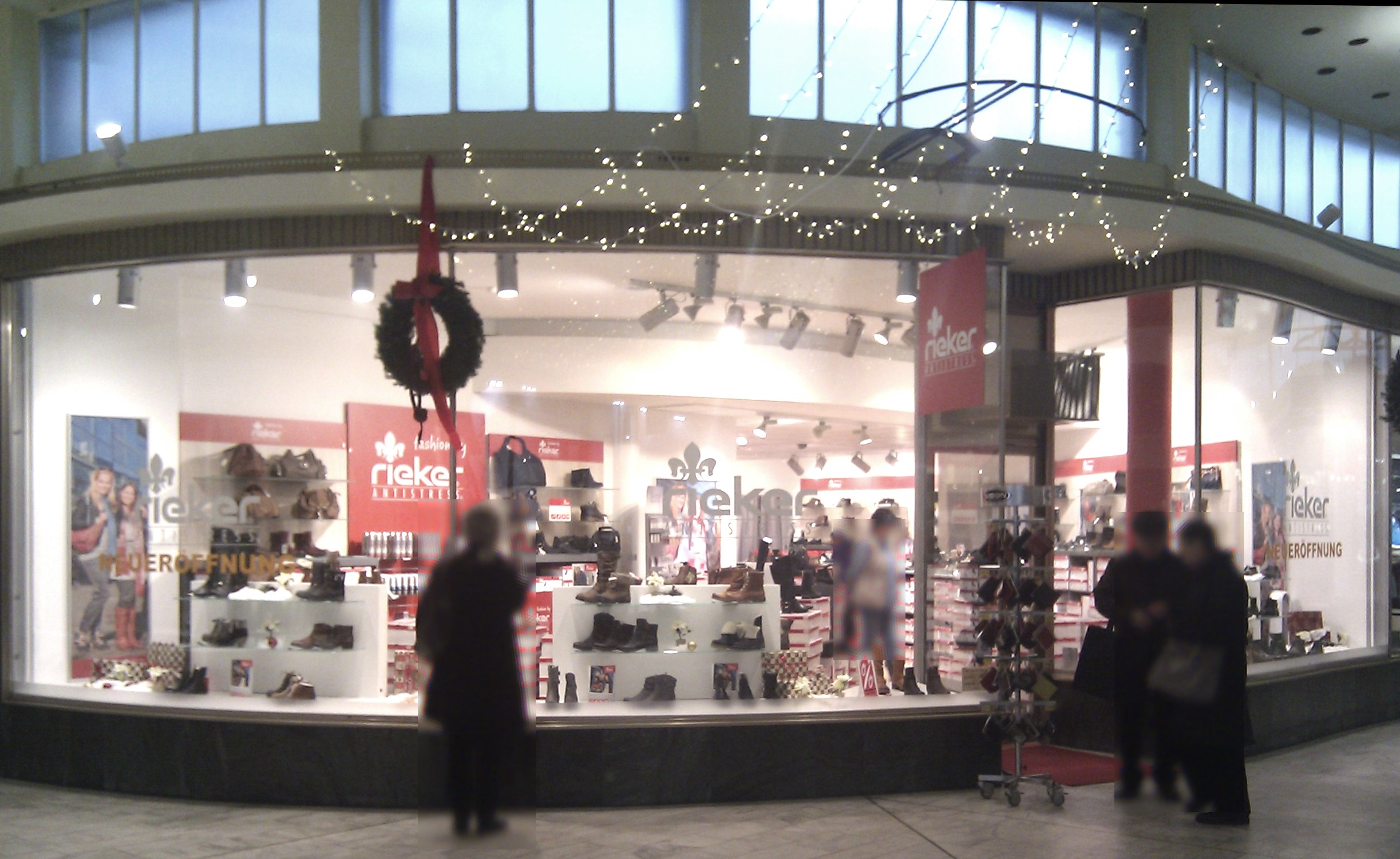 Geschäfte Mannheim P7